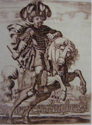 Köprülü Fazıl Ahmed